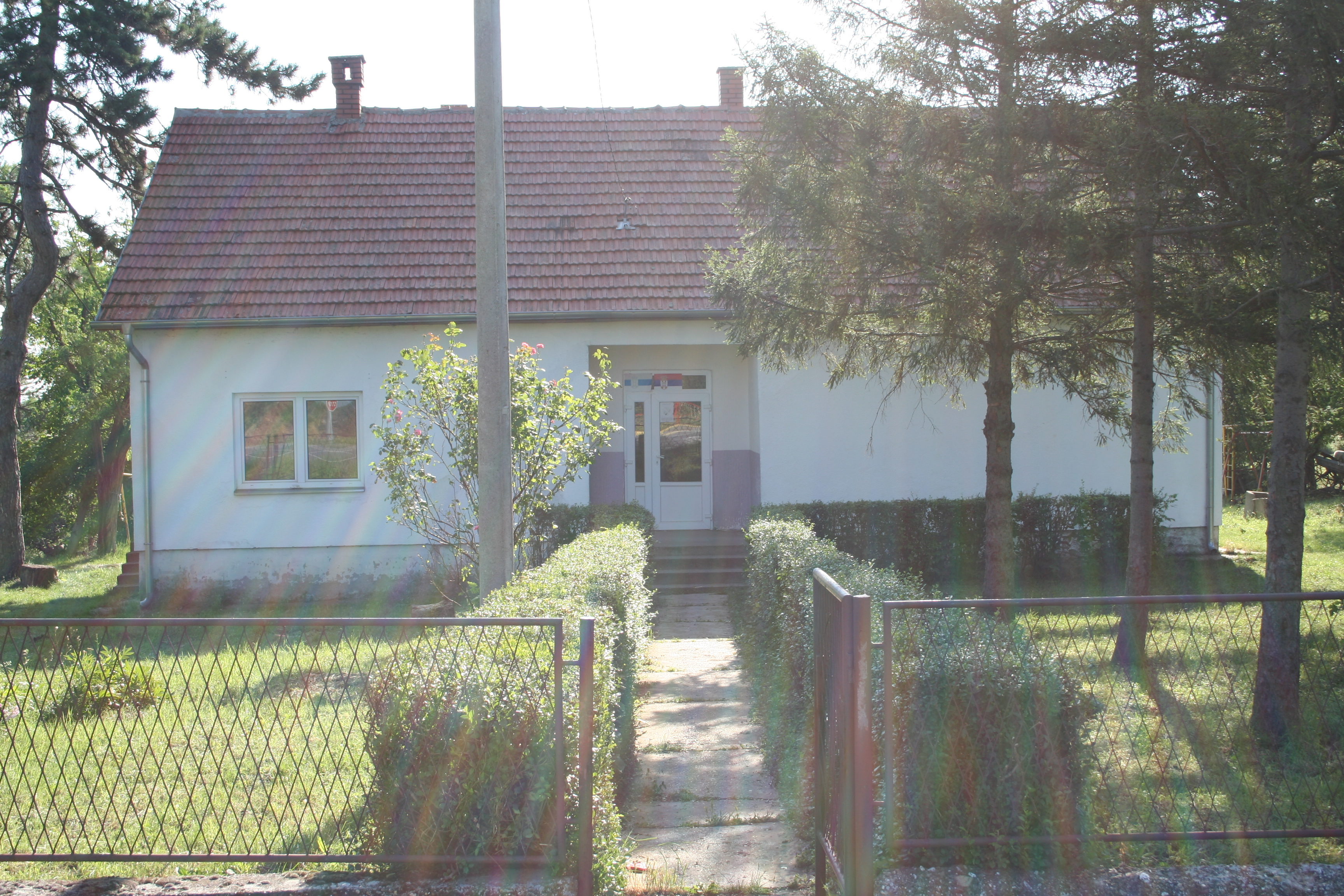 Zgrada škole, Trbušac